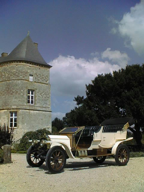 De Dion-Bouton Type DM 20 CV, 4000 ccm V8 double phaeton de 1911. Voiture très rare, et une des plus vieilles à moteur V8 existants. Cliché personnel libre de droit. En arrière plan le château de Doumely Catégorie:histoire automobile